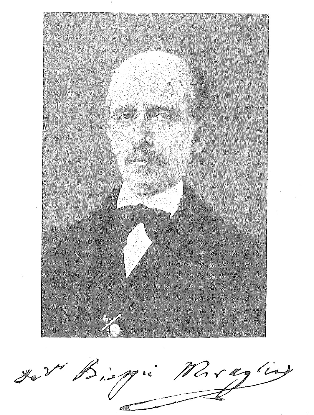 Foto e firma dell'illustre frenologo italiano Biagio Gioacchino Miraglia